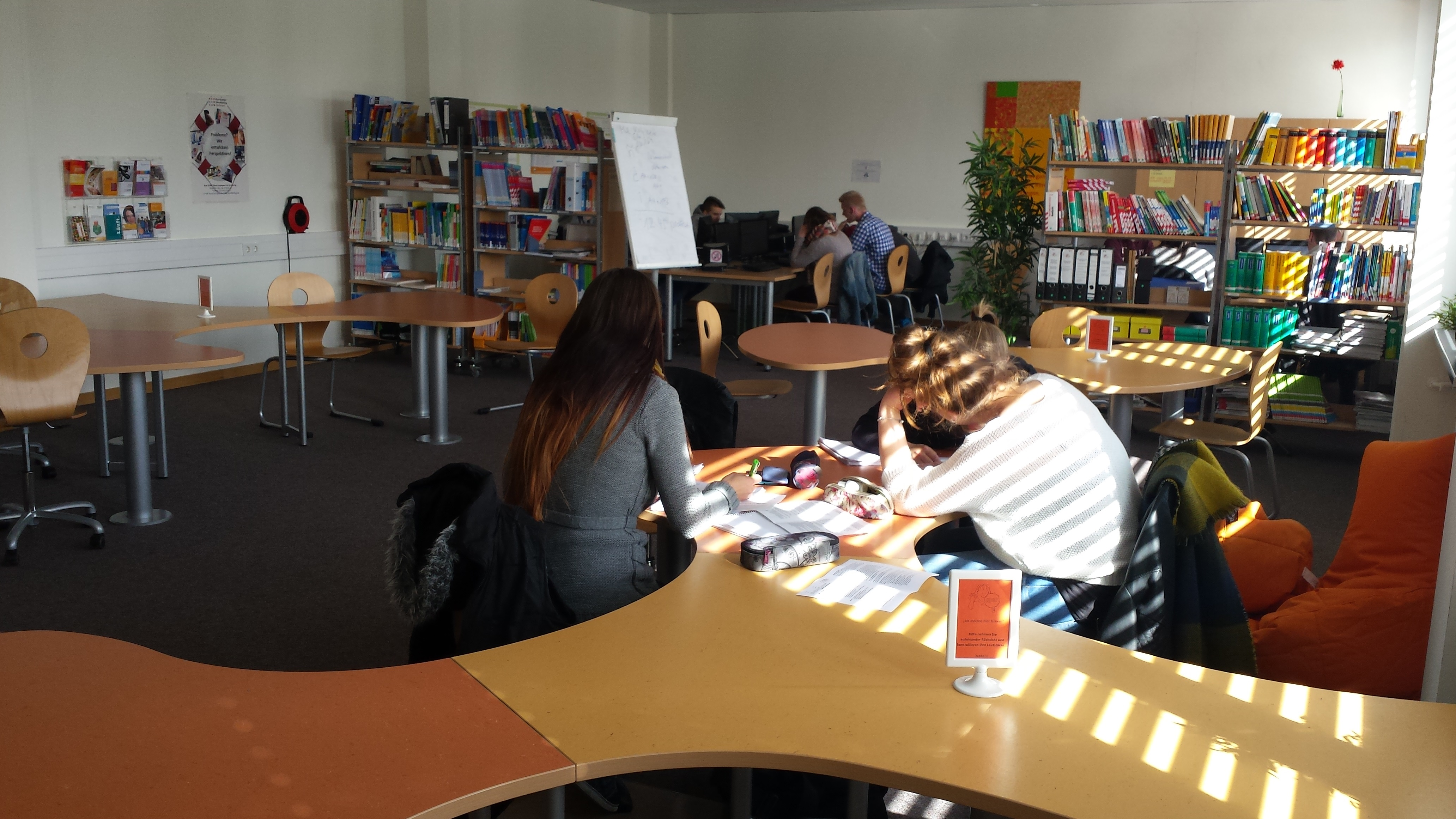 Das Selbstlernzentrum mit Schüler/innen.